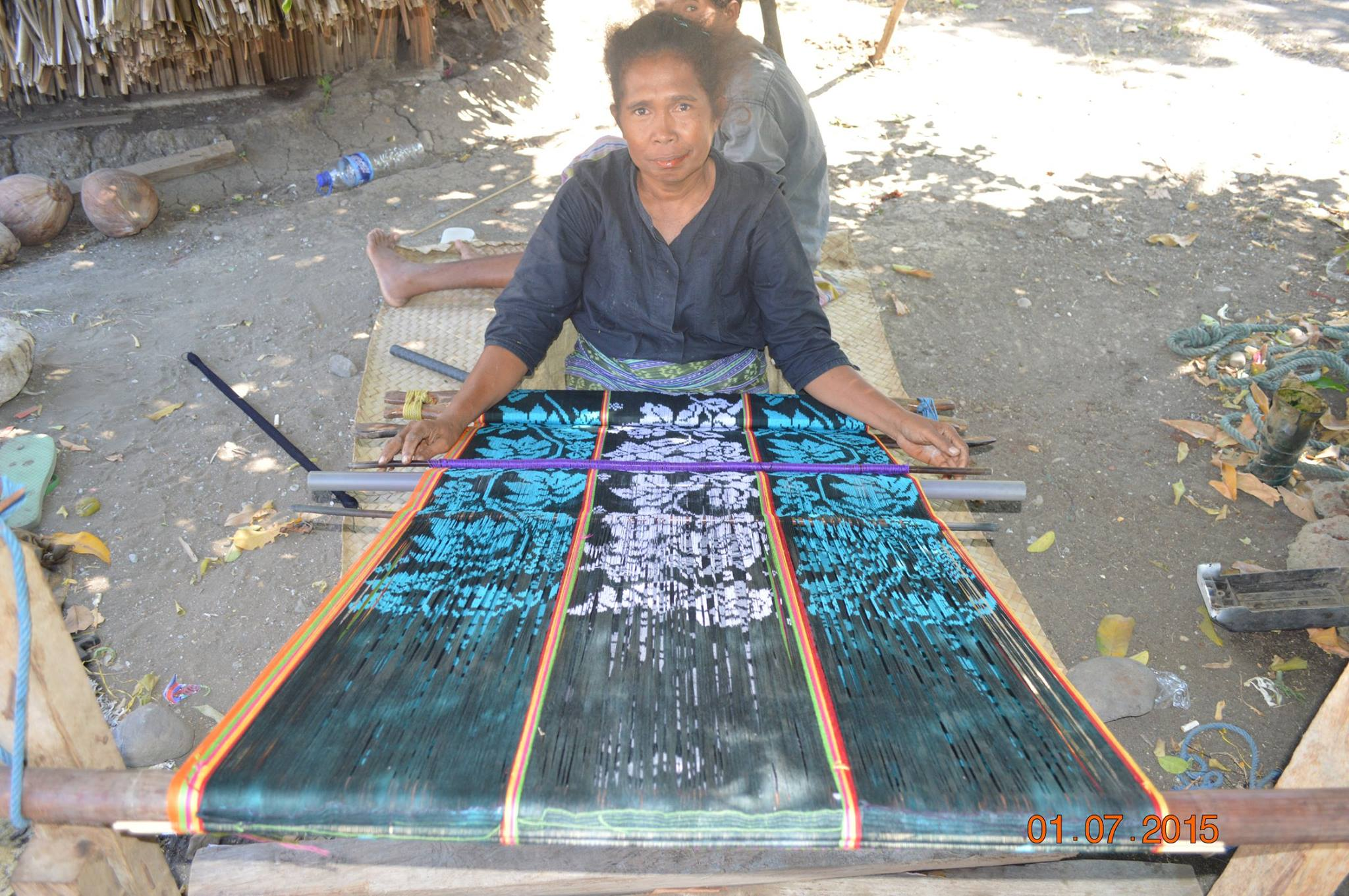 Eine Frau in Oecusse webt einen Tais